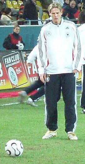 Tim Borowski